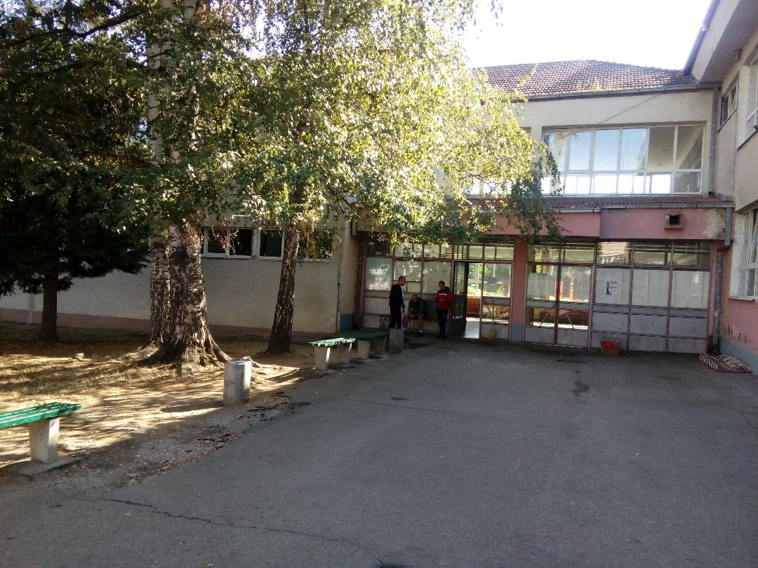 Prva Tehnicka skola Krusevac